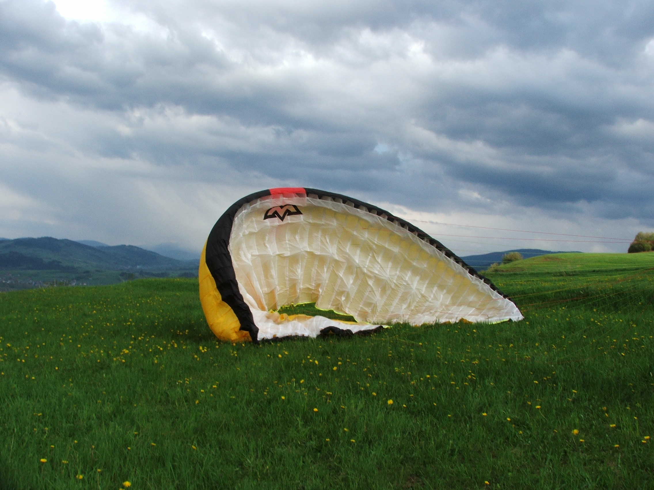 Paralotnia Mac Intox na zboczu góry Matyska w Radziechowach.